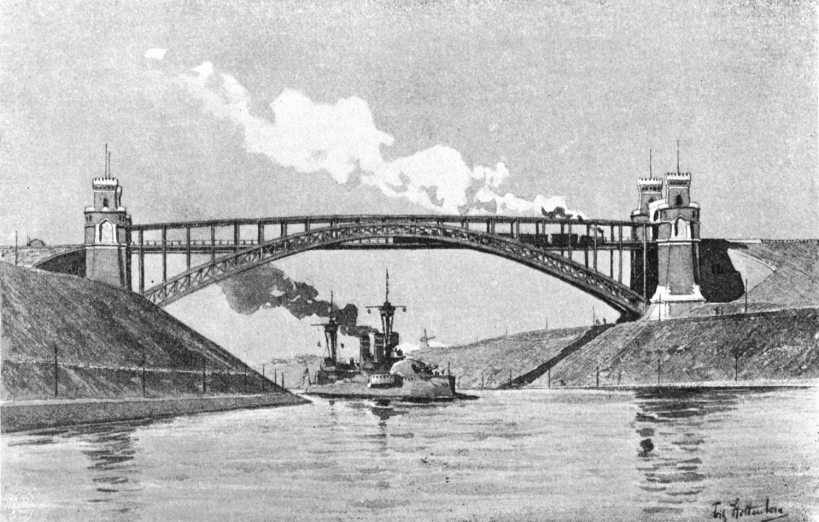 Die Hochbrücke über den Kaiser-Wilhelm-Kanal bei Levensau, Zeichnung von Fritz Stoltenberg.